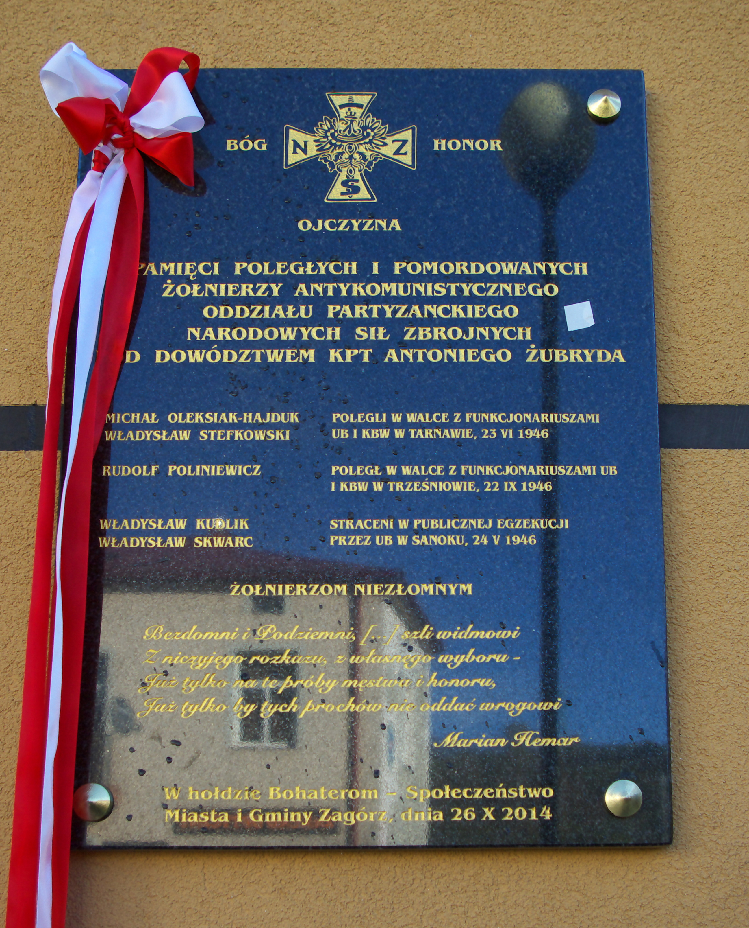 Uroczystość odsłonięcia tablicy pamiątkowej 26 października 2014 na budynku kina Sokół w Zagórzu. Honoruje pięciu żołnierzy NSZ oddziału Antoniego Żubryda. Uhonorowani zostali Michał Oleksiak, Władysław Stefkowski, Rudolf Poliniewicz, Władysław Kudlik i Władysław Skwarc.